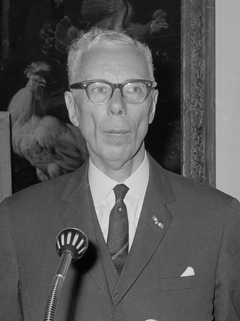 Twaalfeneenhalf jarig bestaan Nederlandse Vereniging Bescherming Voetgangers, spreker Procureur-Generaal bij de Hoge Raad mr. Langemeijer te Den Haag 10 juni 1966